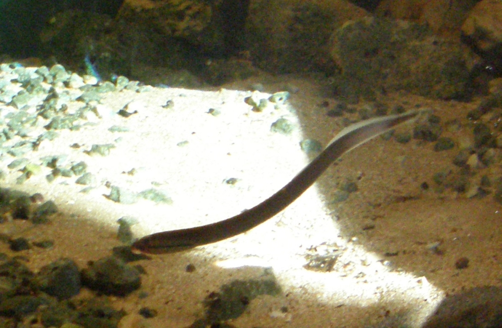 Riserva Naturale delle Sorgenti del Pescara eine Bachneunauges (Lampetra planeri)